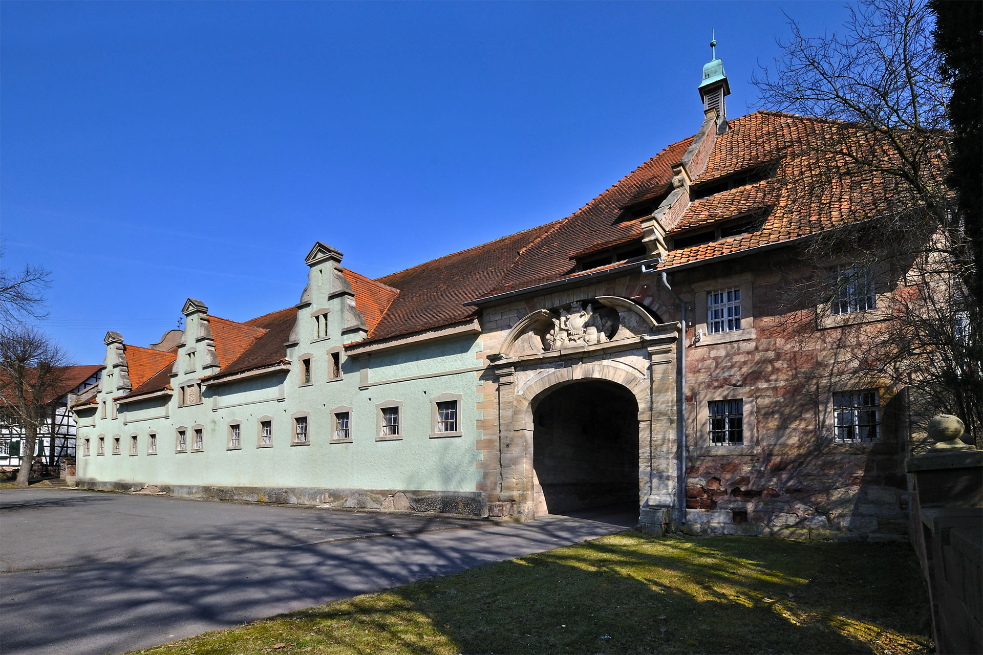 Rittergut Völkershausen Torhaus mit Stallungen - Blick aus Südwest